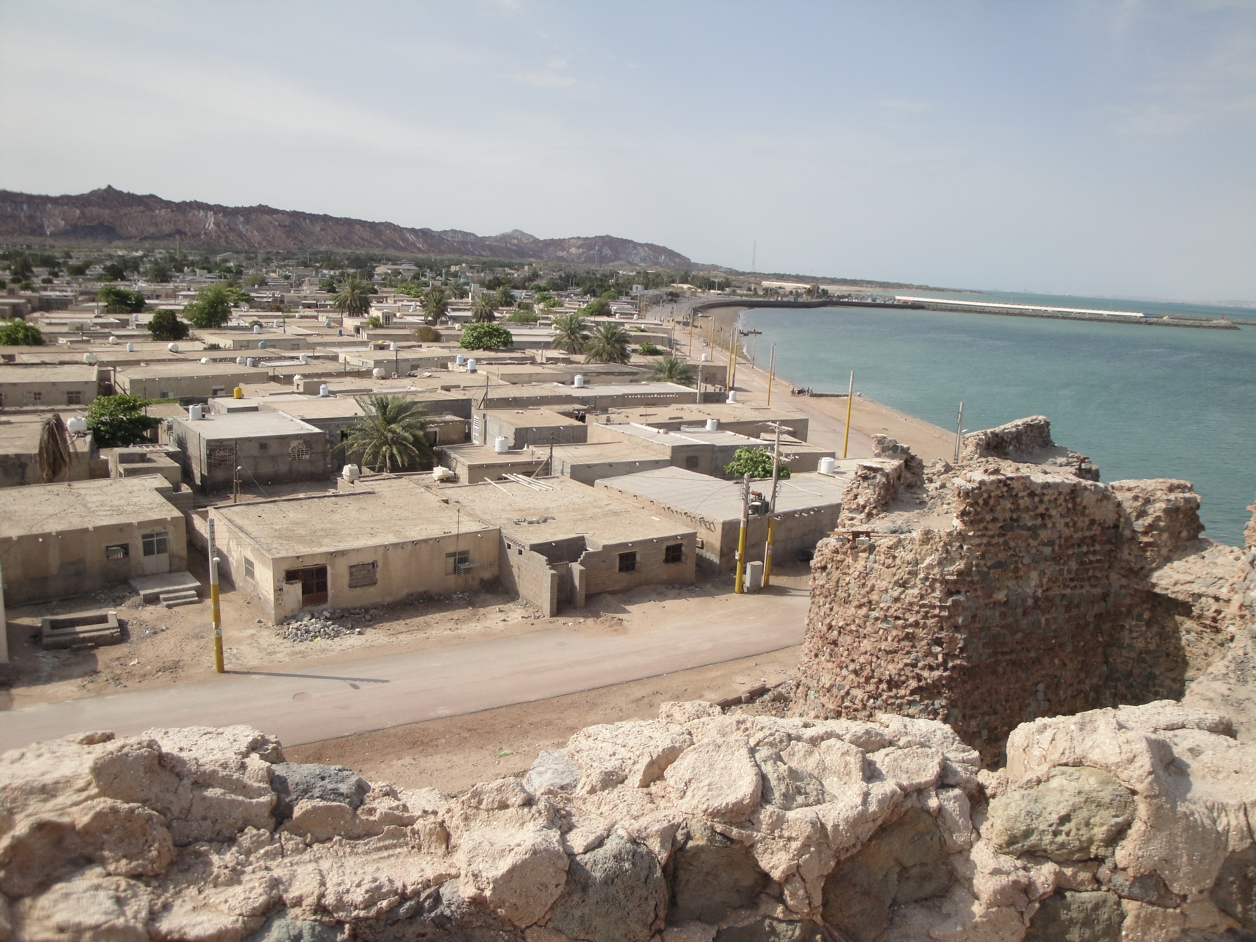 جزيره هرمز Hormoz Island